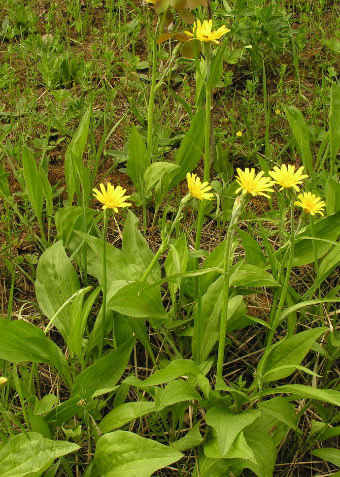 Picture from Letvian Wikipedia. Pušyninės gelteklės (Scorzonera humilis) žiedas Šeima. Astriniai (Asteraceae) Foto: Algirdas, 2006 m. gegužės 20 d., Lietuva